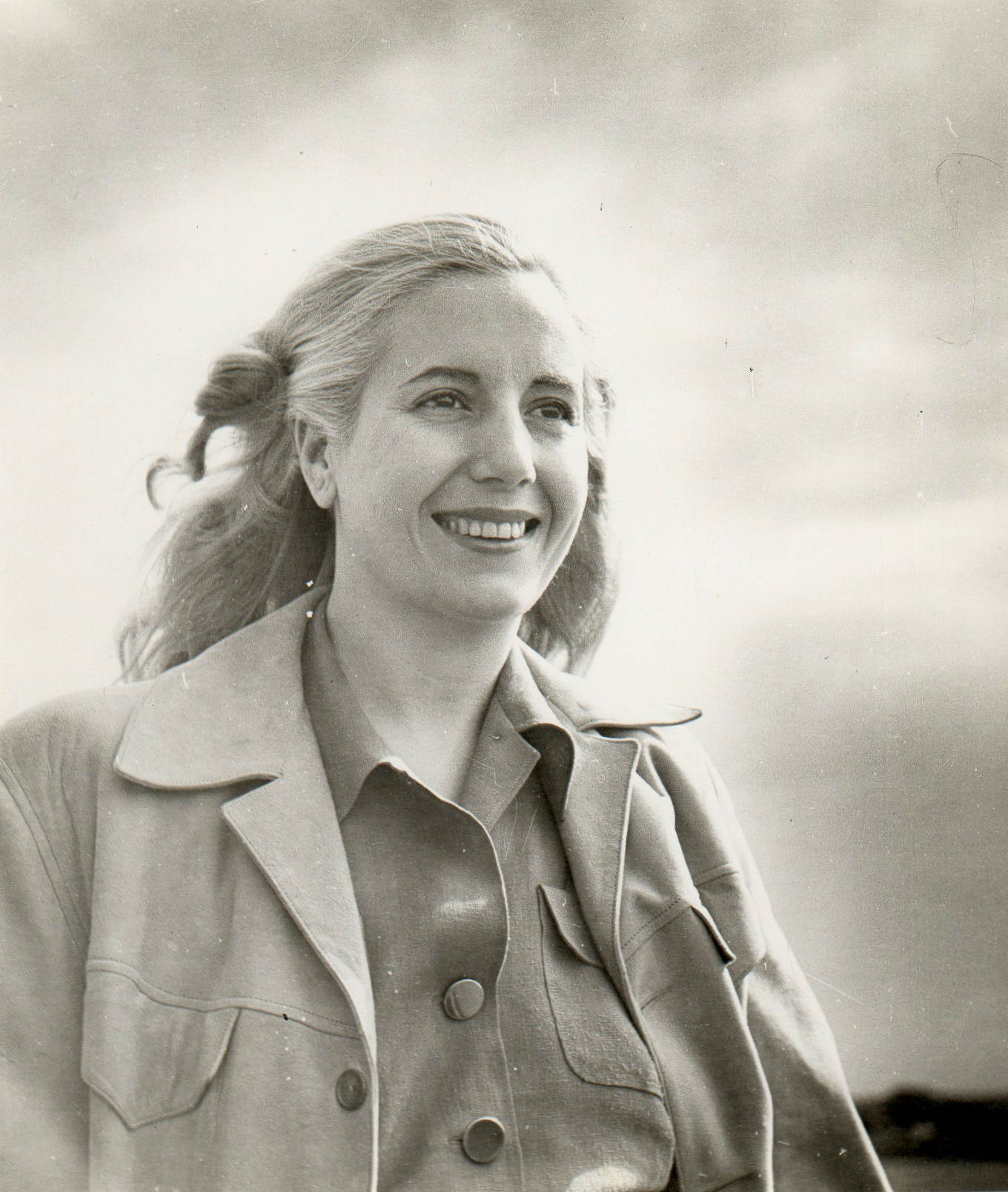 Evita